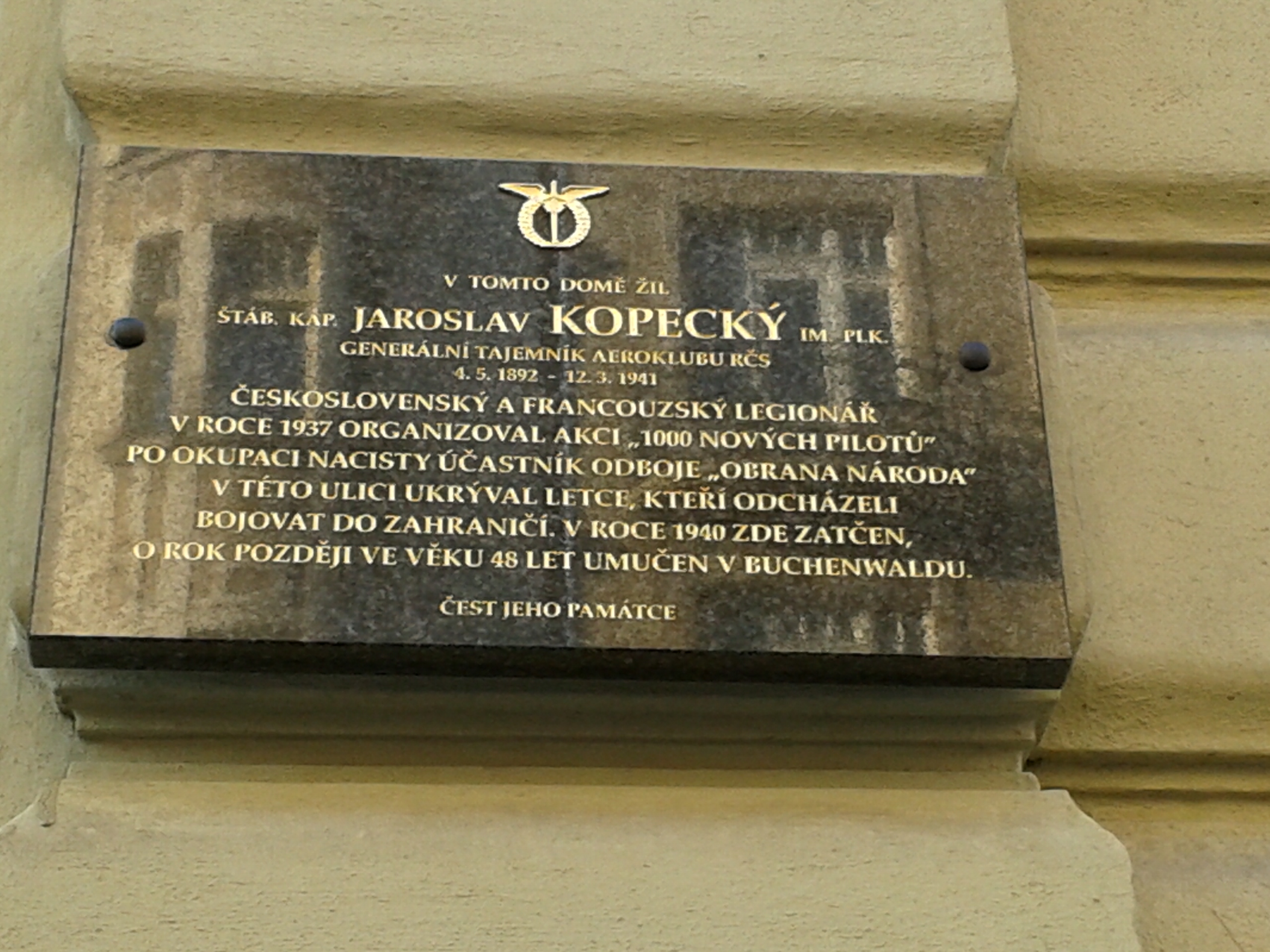 Jaroslav Kopecký (* 4. května 1892, Praha - 12. března 1941, KT Buchenwald) byl za první světové války legionářem v československých legiích v Rusku a ve Francii. Po skončení první světové války pracoval na Ministerstvu národní obrany. V roce 1924 zakládal Aeroklub republiky Československé (ARČS) a byl také jeho generálním tajemníkem. Během německé okupace Čech a Moravy byl činný v ilegální organizaci Obrana národa, kde pomáhal organizovat odchody českých letců za hranice protektorátu, aby mohli bojovat v cizineckých jednotkách. V roce 1940 byl zatčen gestapem a o rok později byl umučen v KT Buchenwald. Pamětní deska je umístěna na vnější fasádě domu na adrese Lesnická 1154/6, 150 00 Praha 5 – Smíchov, kde Jaroslav Kopecký žil. Na desce je nápis: V tomto domě žil / štáb. kap. Jaroslav KOPECKÝ IM plk. / generální tajemník aeroklubu RČS / 4.5.1892 - 12.3.1941 / československý a francouzský legionář / v roce 1937 organizoval akci "1000 nových pilotů" / po okupaci nacisty účastník odboje "Obrana národa" / v této ulici ukrýval letce, kteří odházeli / bojovat do zahraničí. V roce 1940 zde zatčen, / o rok později ve věku 48 let umučen v Buchenwaldu. / čest jeho památce